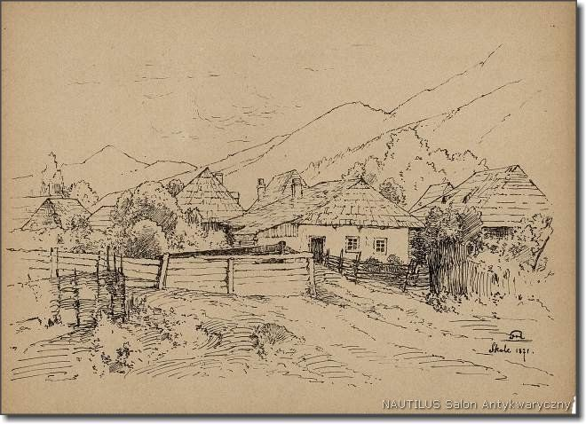 Skole, 1880